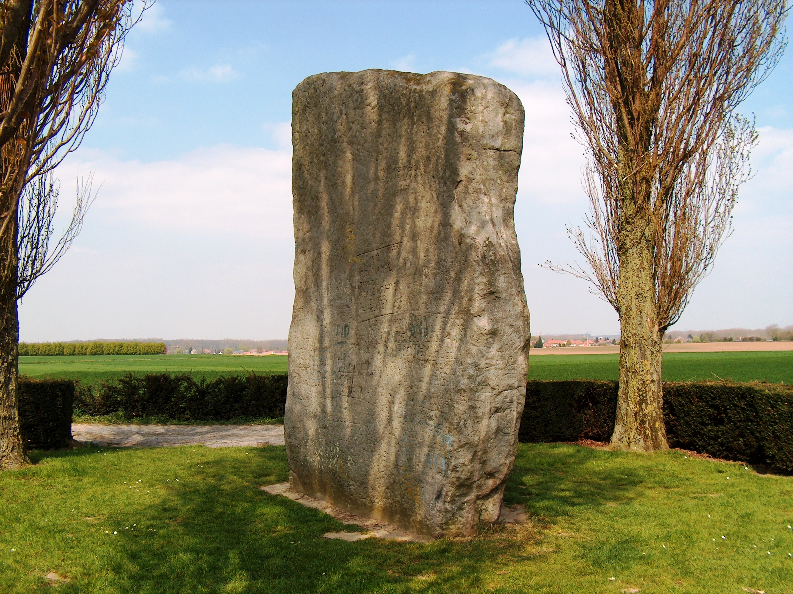 Pierre Brunehaut Quell: fr Wiki a commons vum User Varech